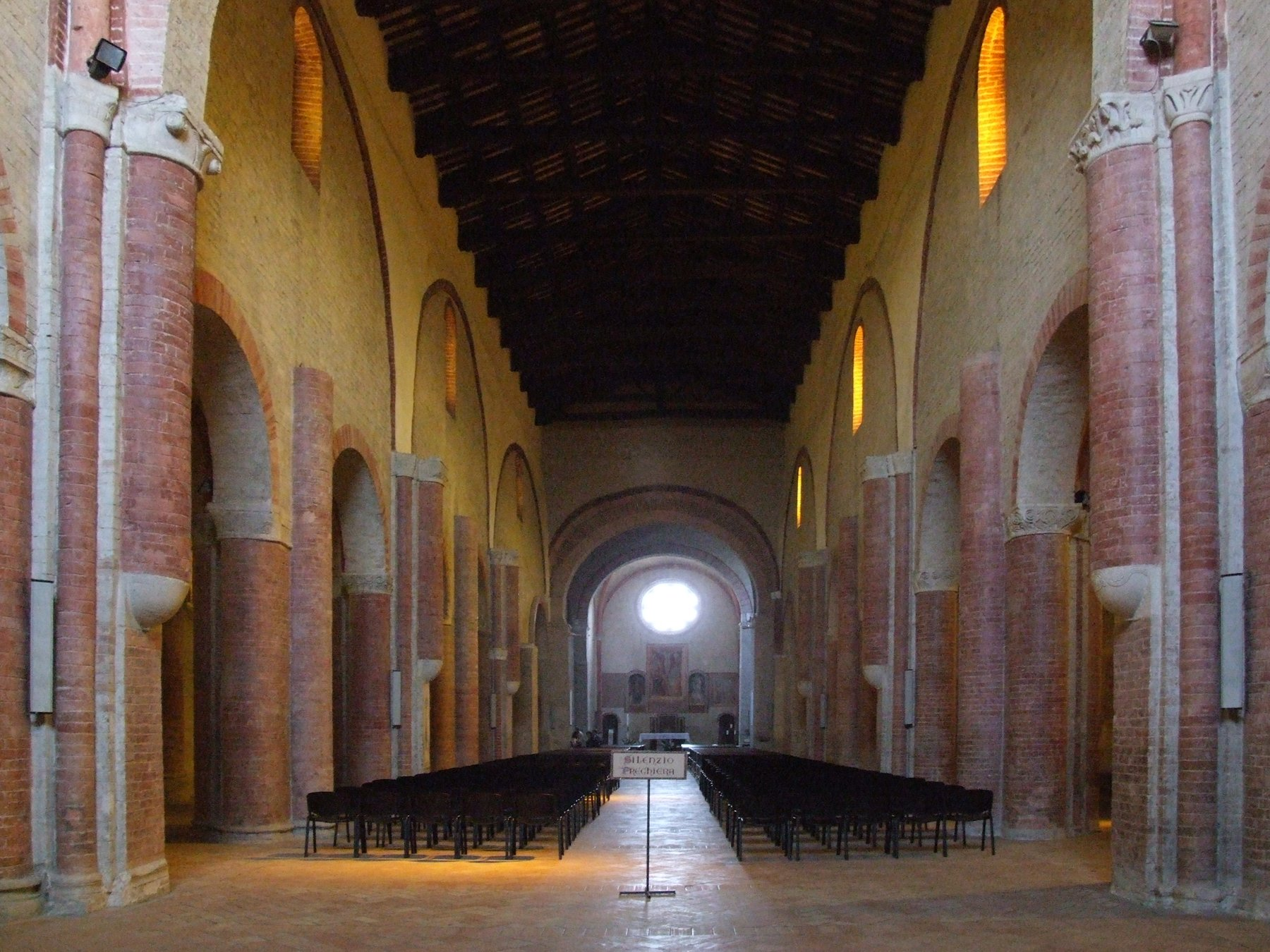 Chiaravalle Abbey, Fiastra Native nameAbbazia di Chiaravalle di FiastraLocationFiastra, Marche, ItalyCoordinates43° 13′ 18″ N, 13° 24′ 19″ E Established1142Web page control : Q1775124 VIAF: 241191208 institution QS:P195,Q1775124